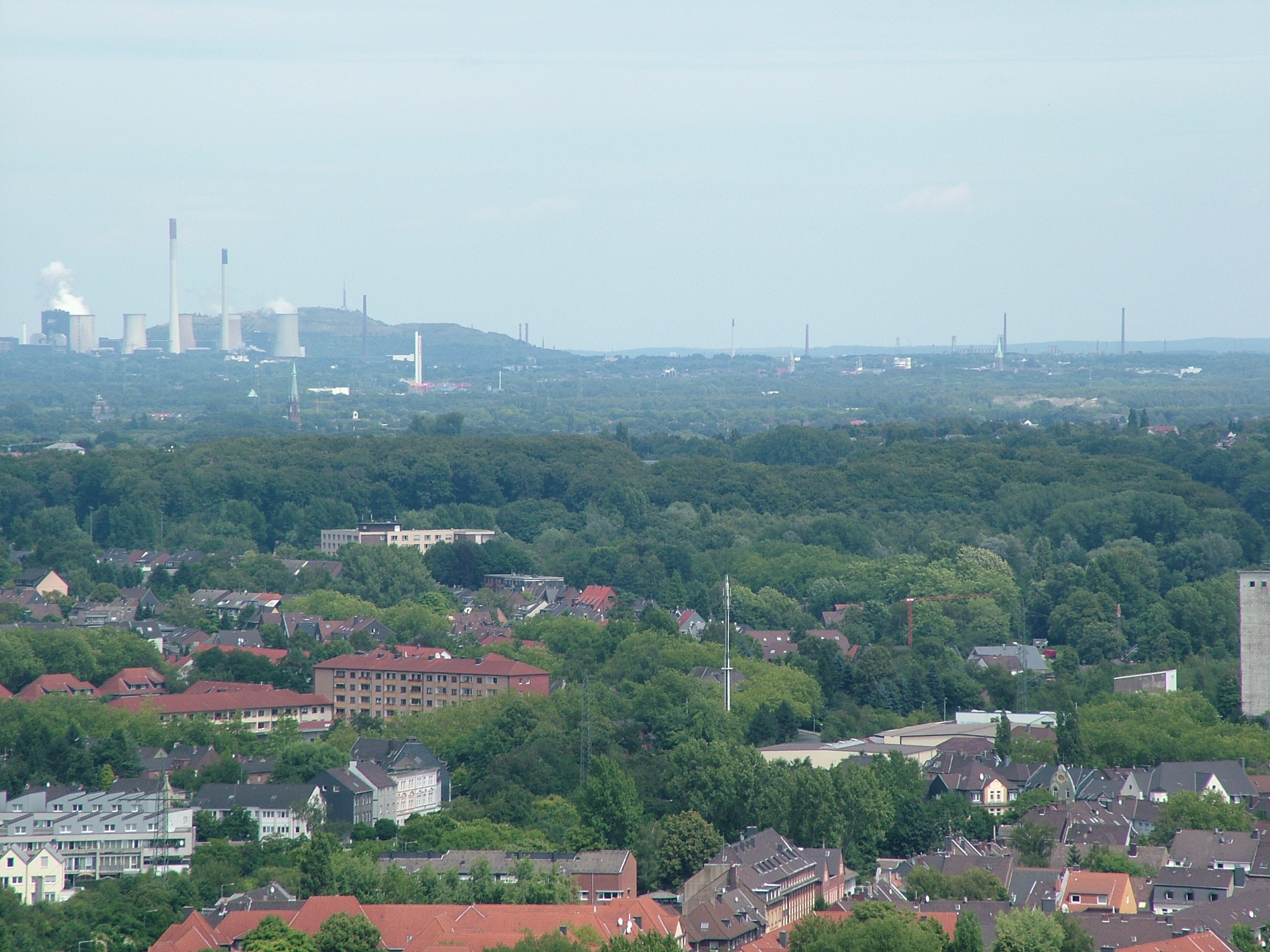 View from Gasometer in Oberhausen: Gladbeck.